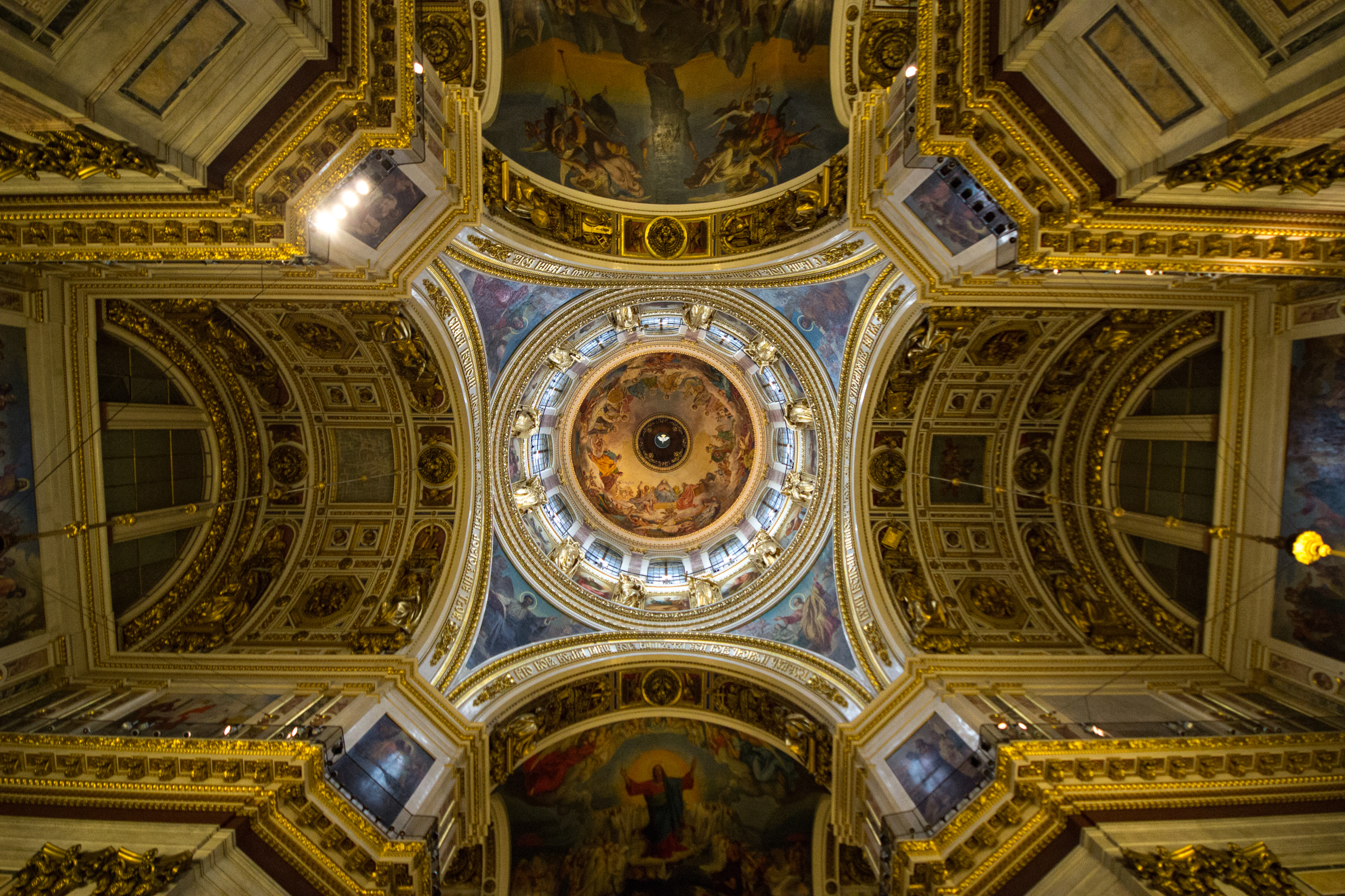 Собор Исаакиевский: площадь Исаакиевская, Адмиралтейский район, Санкт-Петербург